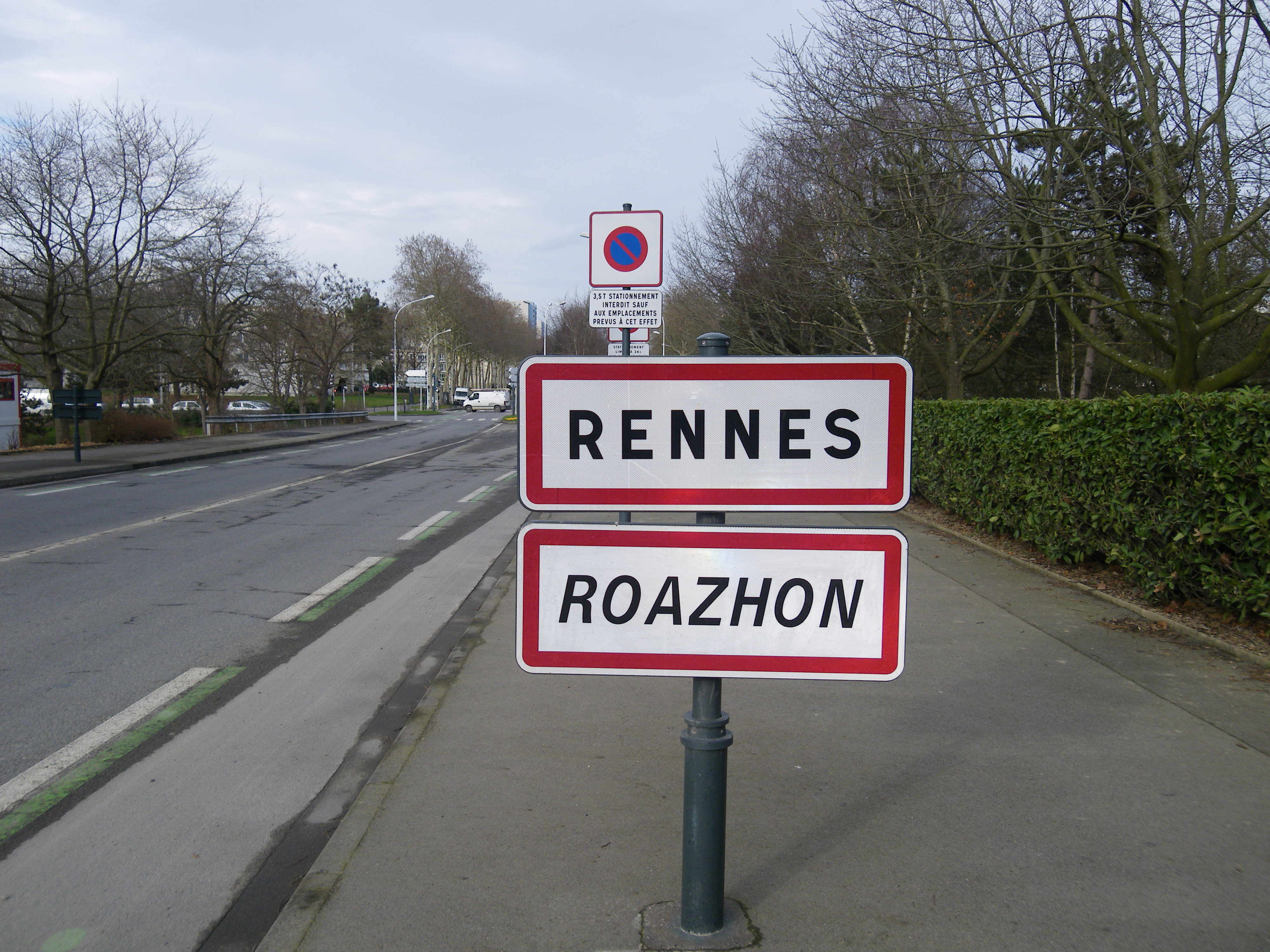 l'entrée de rennes route de chatillon sur seiche